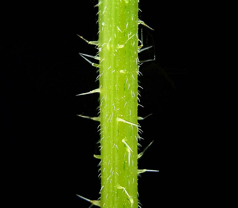 Urtica urens